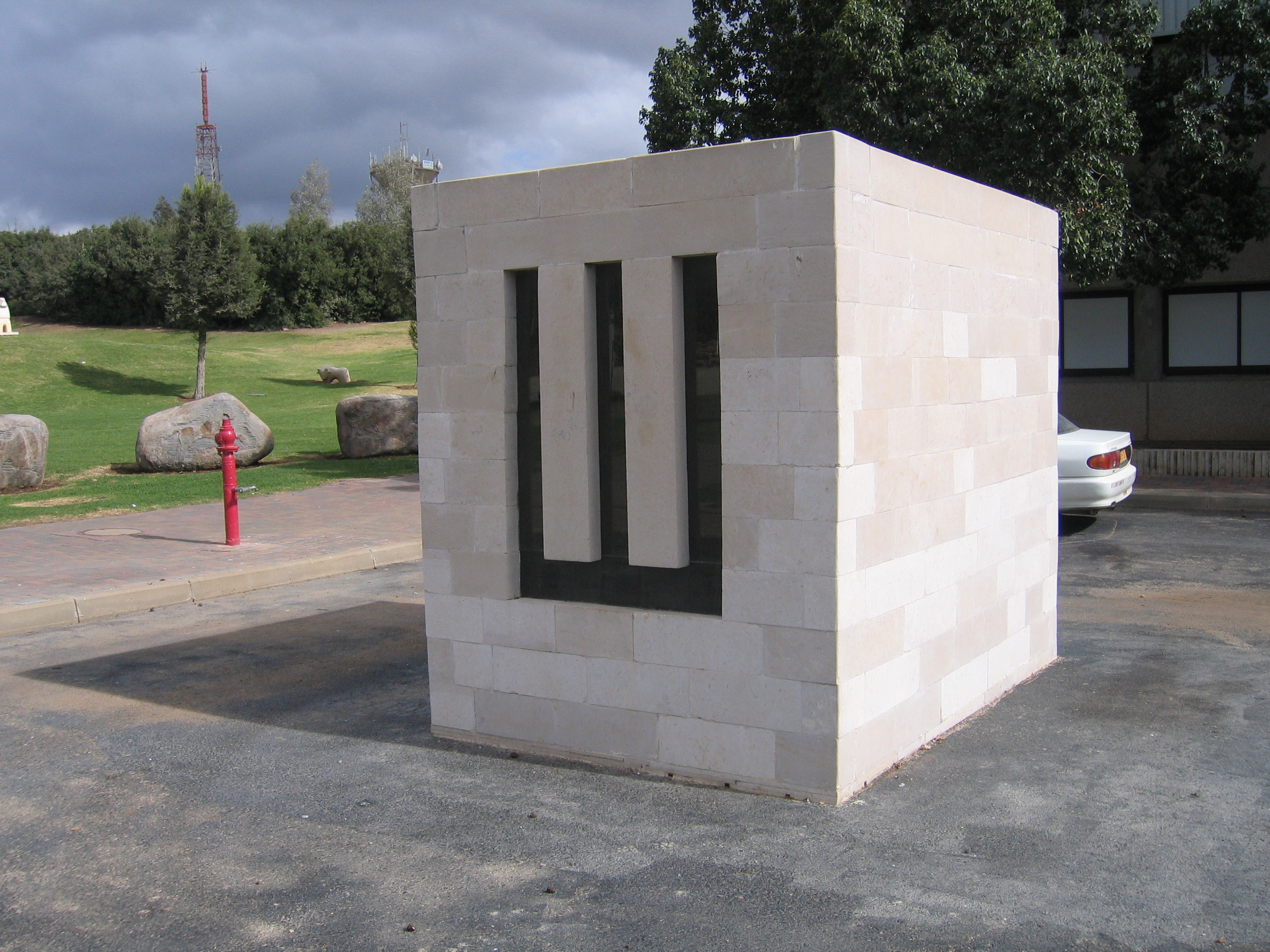 Belu Simion Fainaru, Sham/There (1996), stone, glass, iron, earth 240/200/300 cm. בלו סימיון פיינרו, שם (1996), אבן, זכוכית, ברזל ואדמה, 240/200/300 ס"מ.